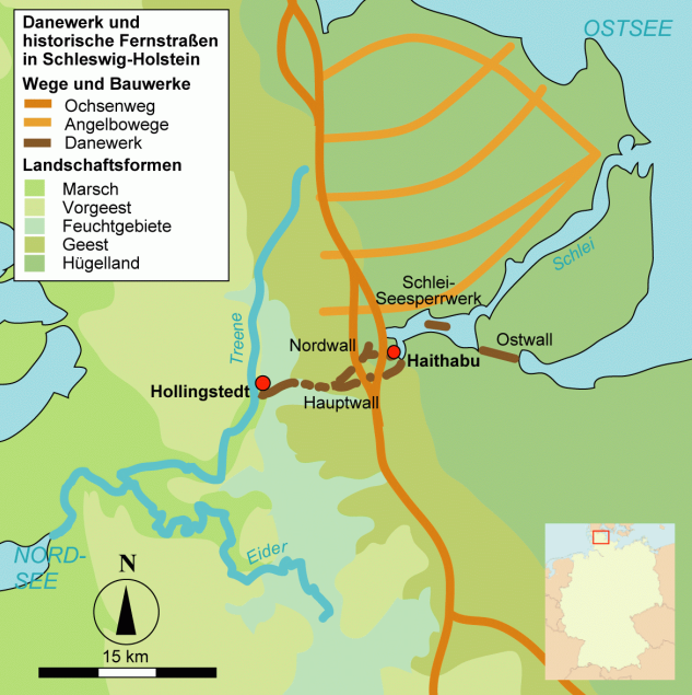 aus wp-de (Karte selbst gezeichnet) Der Verlauf des Ochsenwegs und der Angelbowege ist nicht überall genau bekannt, so dass ihre Lage nur annäherungsweise dargestellt ist. Zur besseren Orientierung bezieht sich die Karte auf den modernen Küstenverlauf. Überarbeitet unter Verwendung von Image:Germany map blank.png